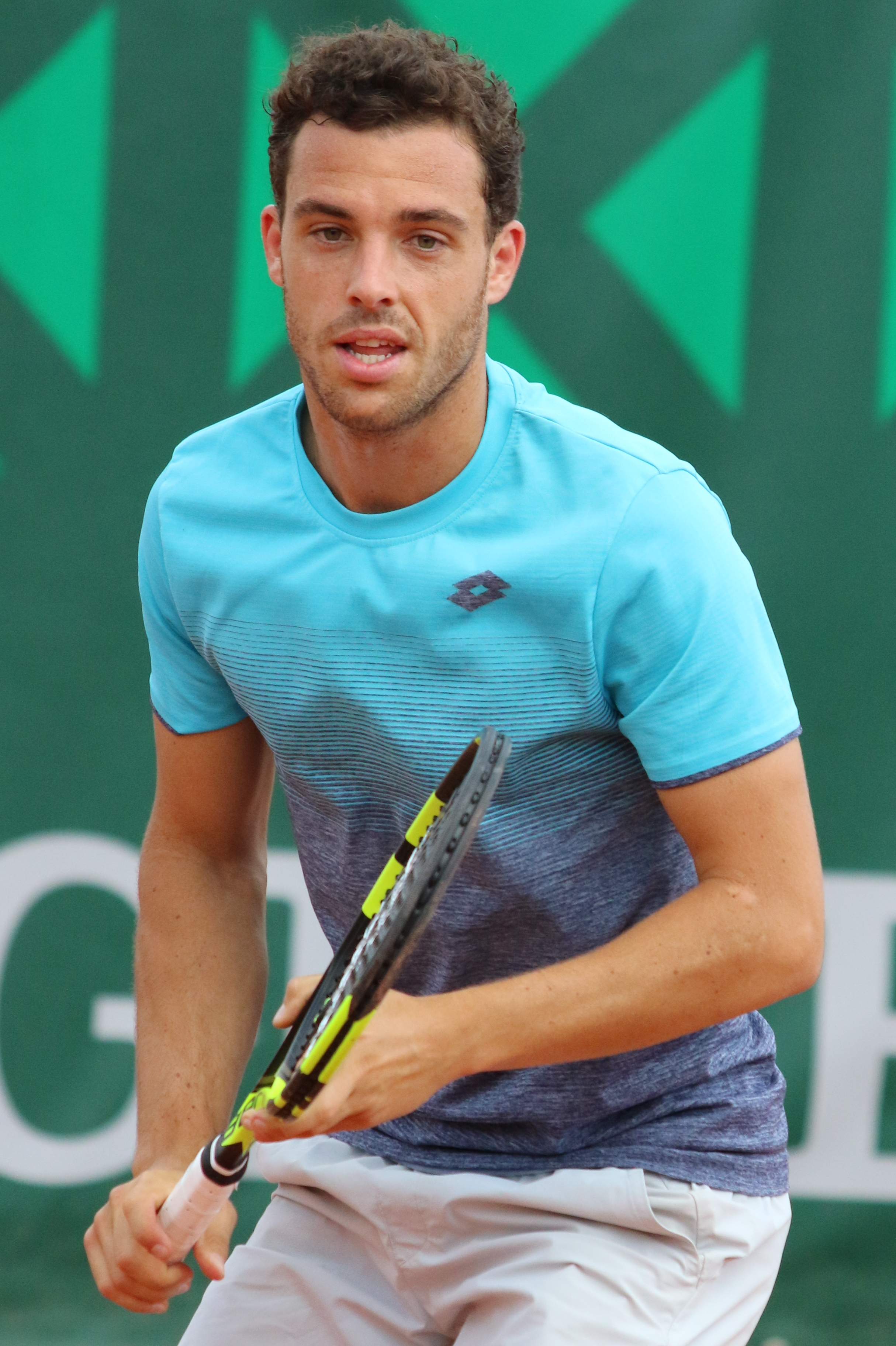 Cecchinato RG18